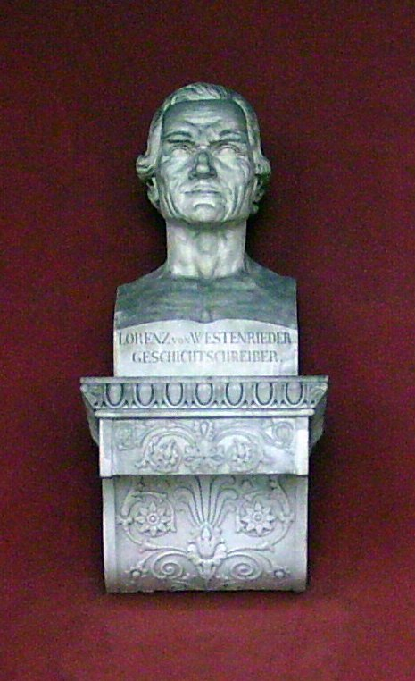 Bust of Lorenz von Westenrieder at Ruhmeshalle ("Hall of fame"), München, Germany. Picture taken by myself: Dominik Hundhammer, München, 27 March 2006.